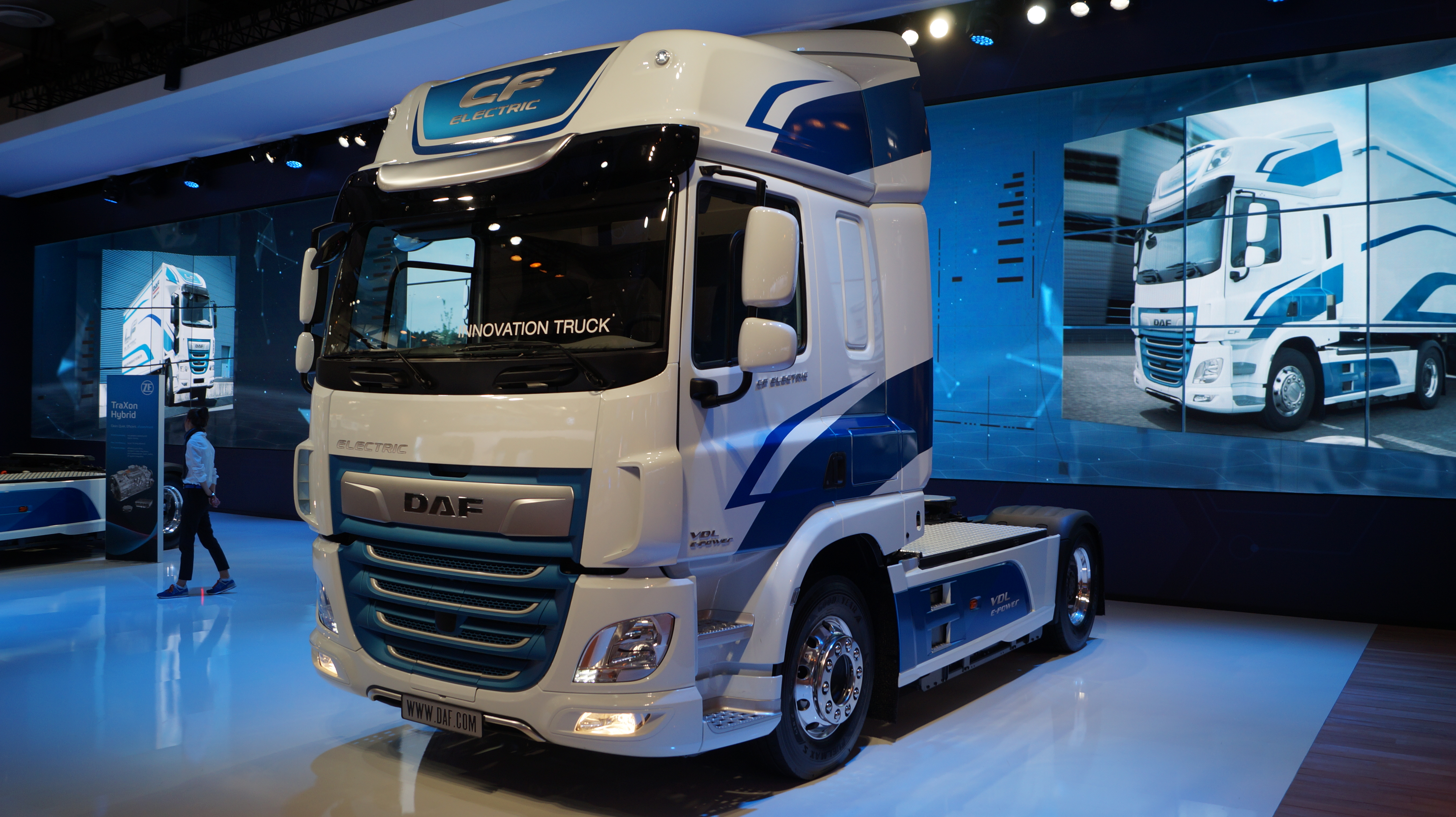 Schrägansicht der Front eines DAF CF Electric, ausgestellt auf der IAA 2018.